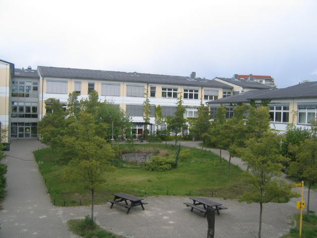 Blick über den Innenhof, mit Teich.